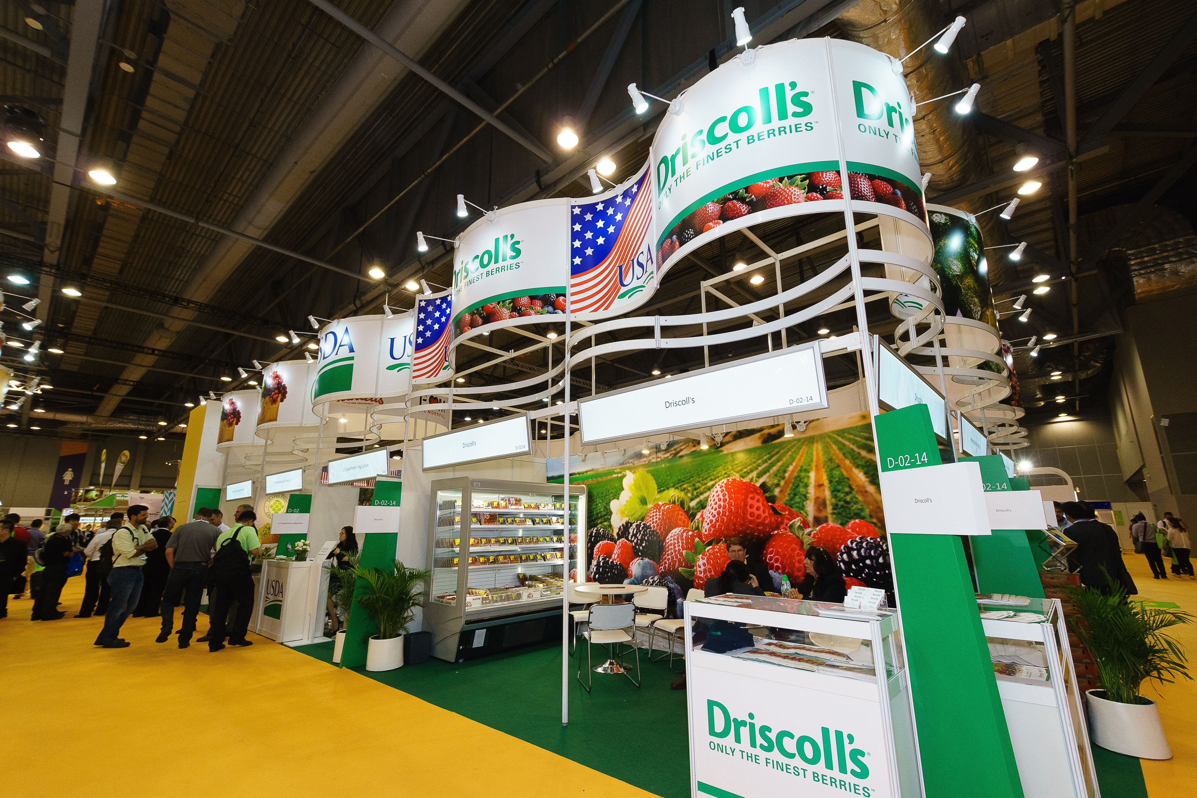 Pohled do haly na veletrhu Fruit Logistica